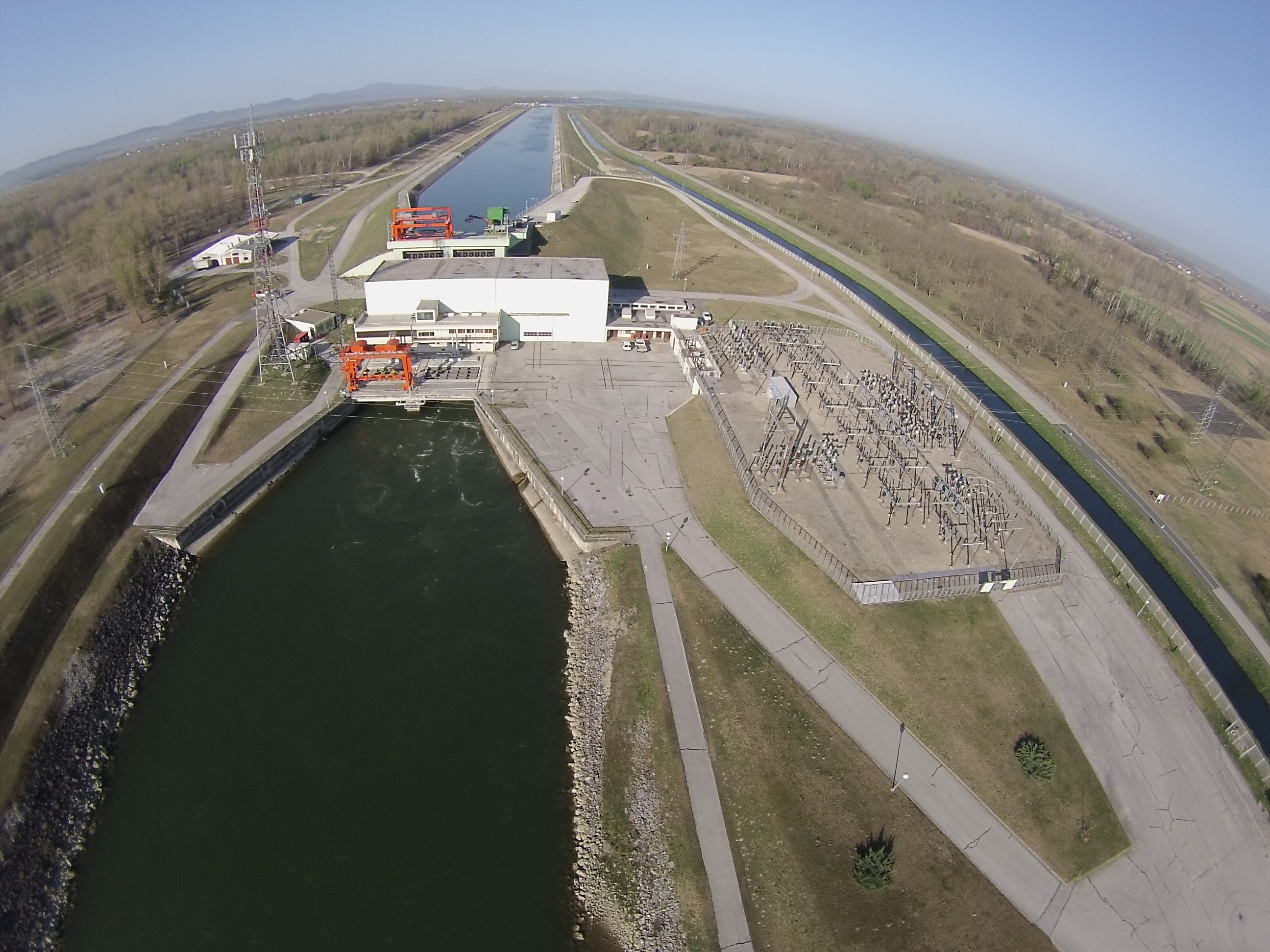 Snimka iz zraka